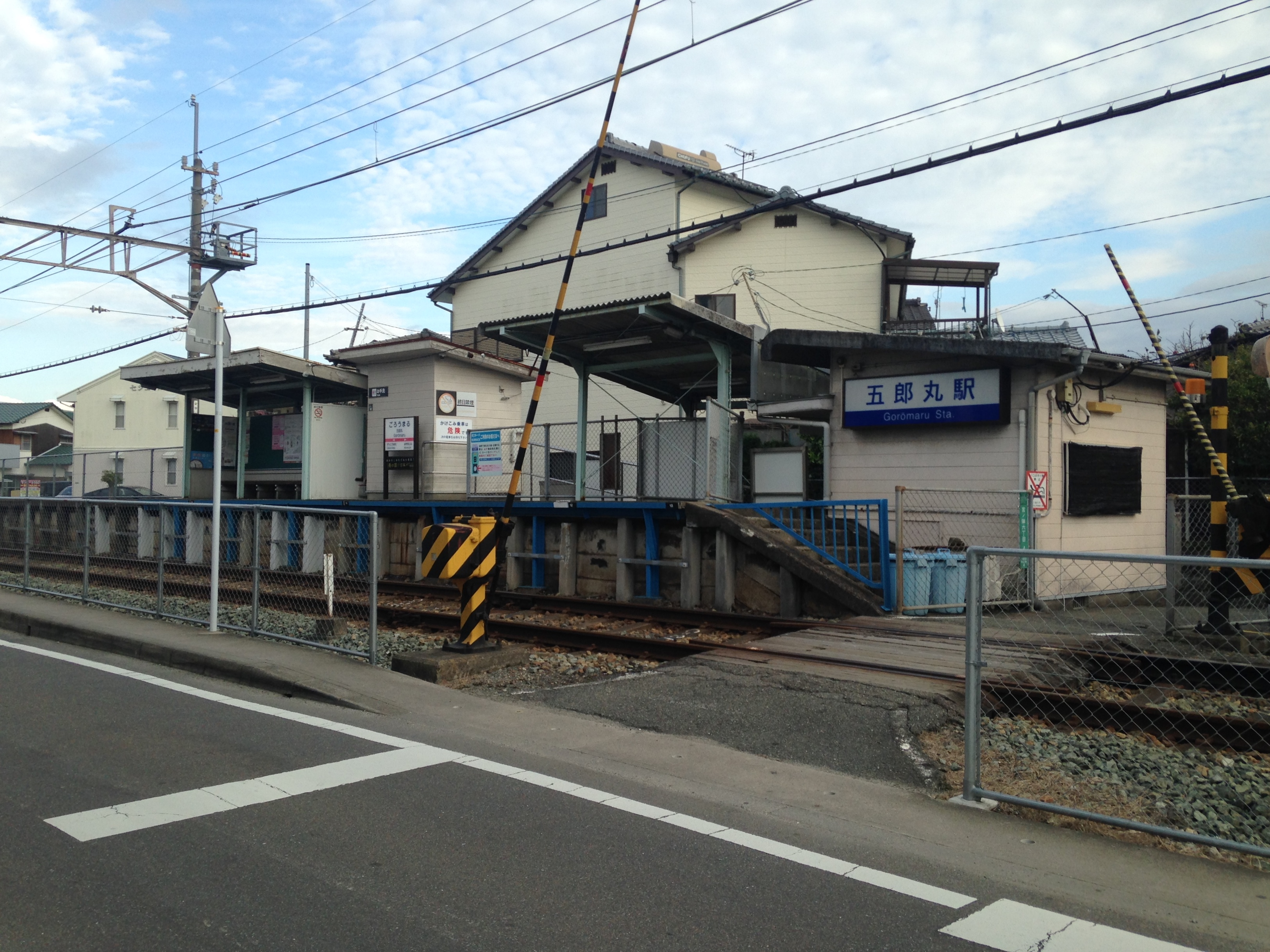 五郎丸駅駅舎